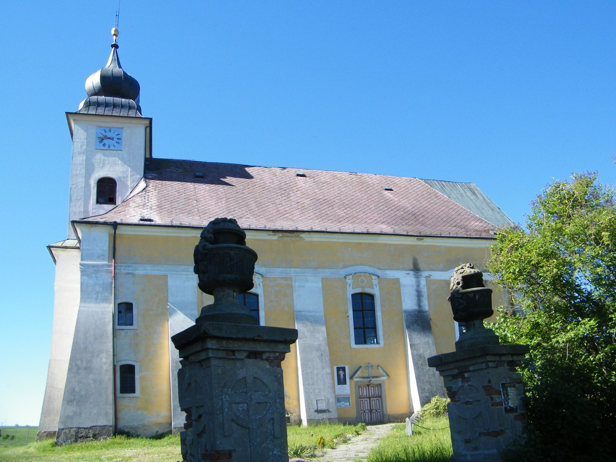 Kostel Navštívení Panny Marie v Lobendavě, jižní stěna